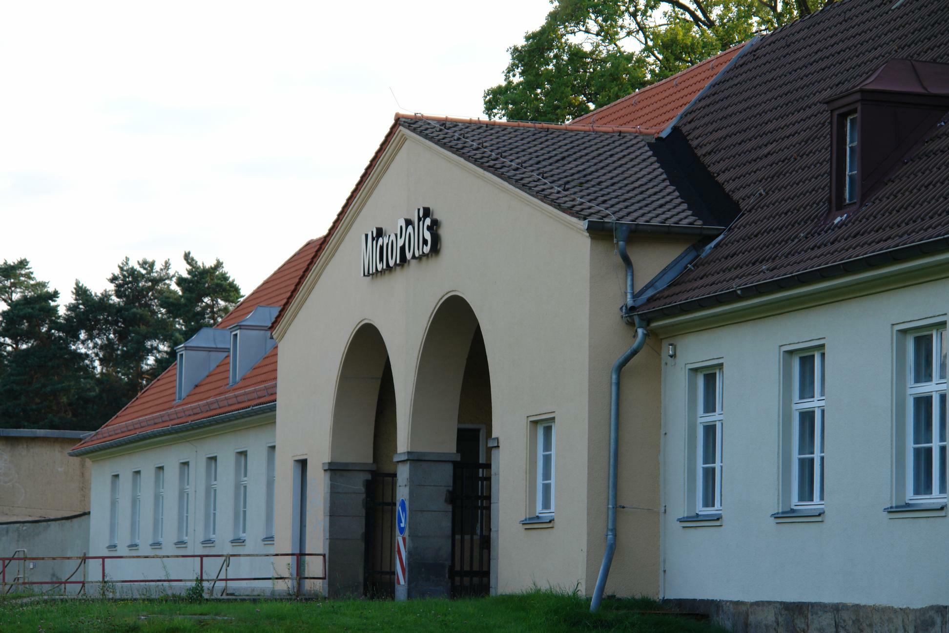 ehemalige Luftkriegsschule Eingang (heute Micropolis)